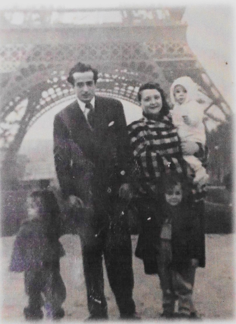 משפחת גואז בפריז 1955 האב חיים והאם משמאל יעקב גזלמטה מימין האחות מרטין והתינוקת אורנה בידי האם